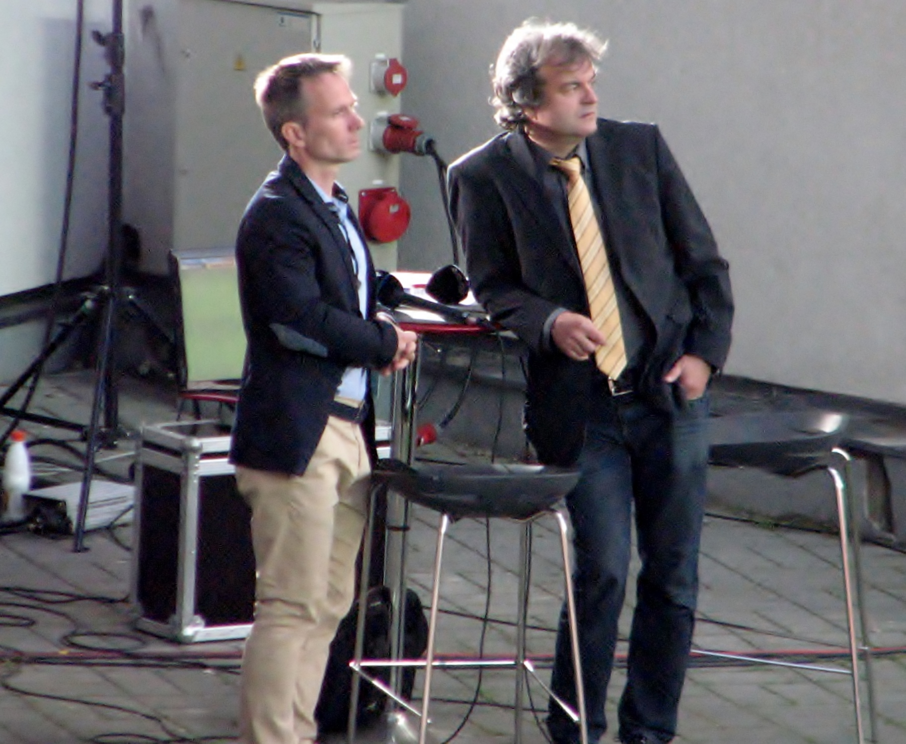 Martin Reim ja Marko Kaljuveer kommenteerimas Eesti ja Tadžikistani jalgpallikoondise mängu A. Le Coqi staationil